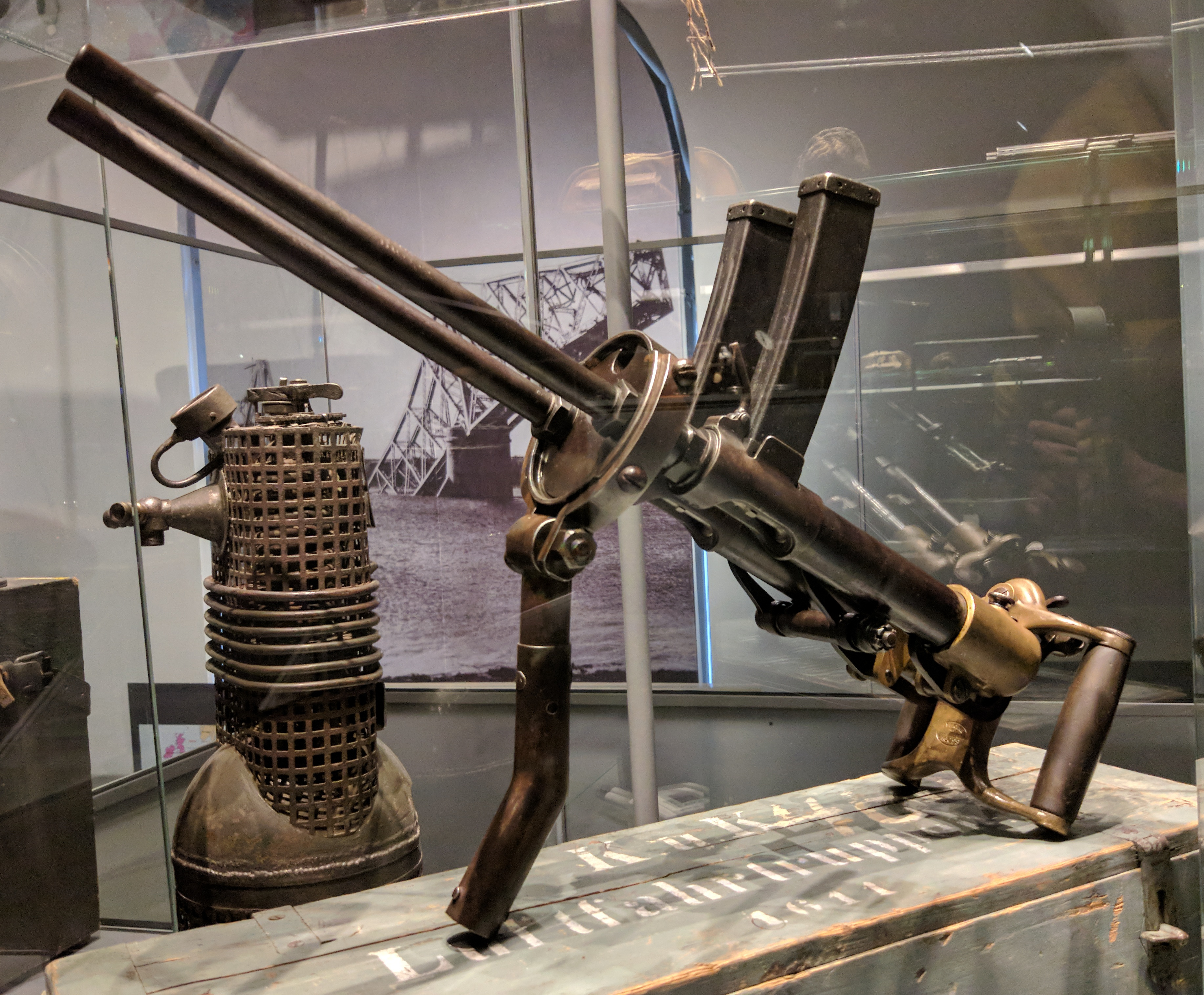 Italijanska dvocevna brzostrelka/mitraljez Villar-Perosa